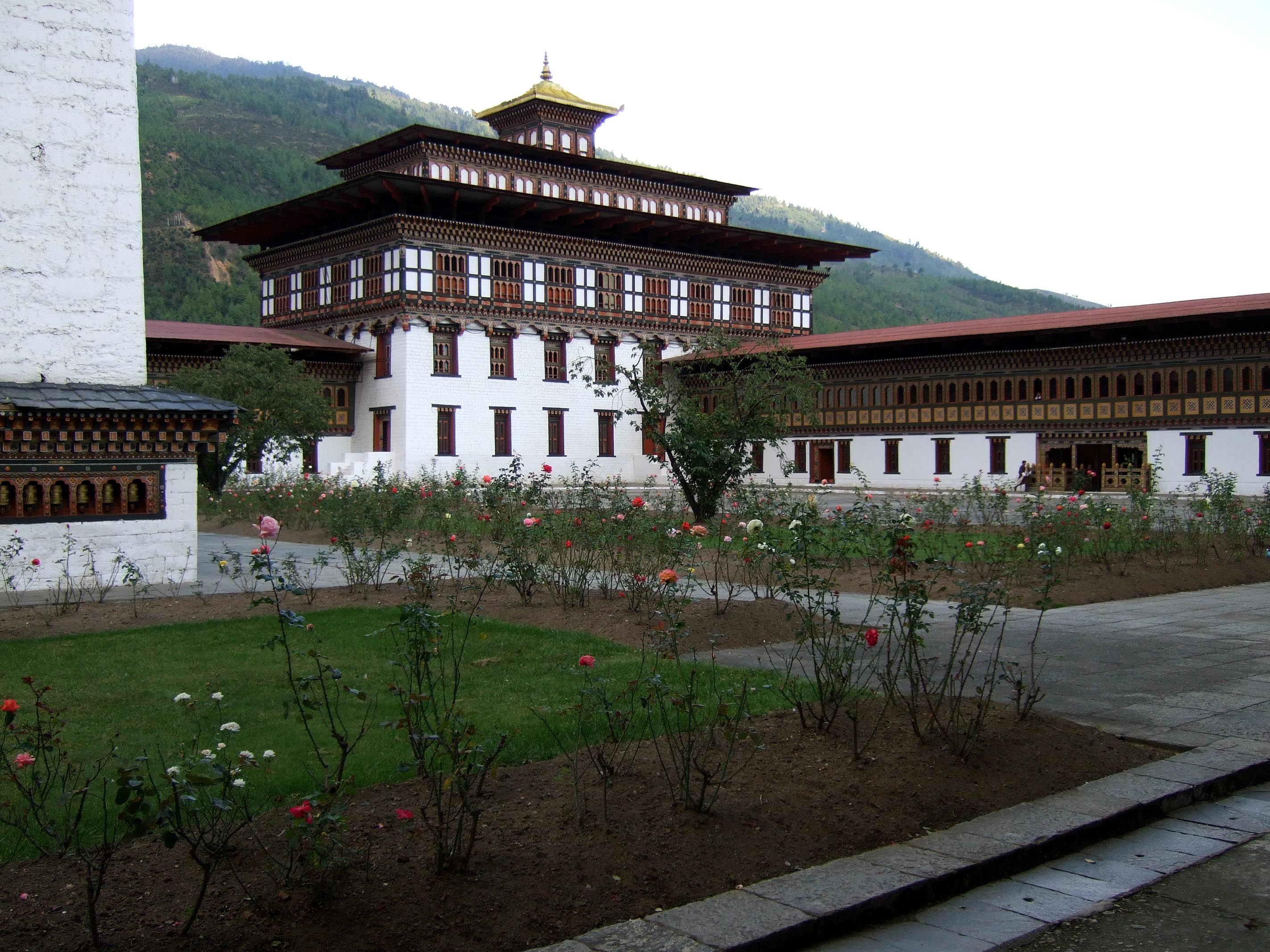 Innenhof des Sitzes der Regierung von Bhutan (Dzong von Thimpu)